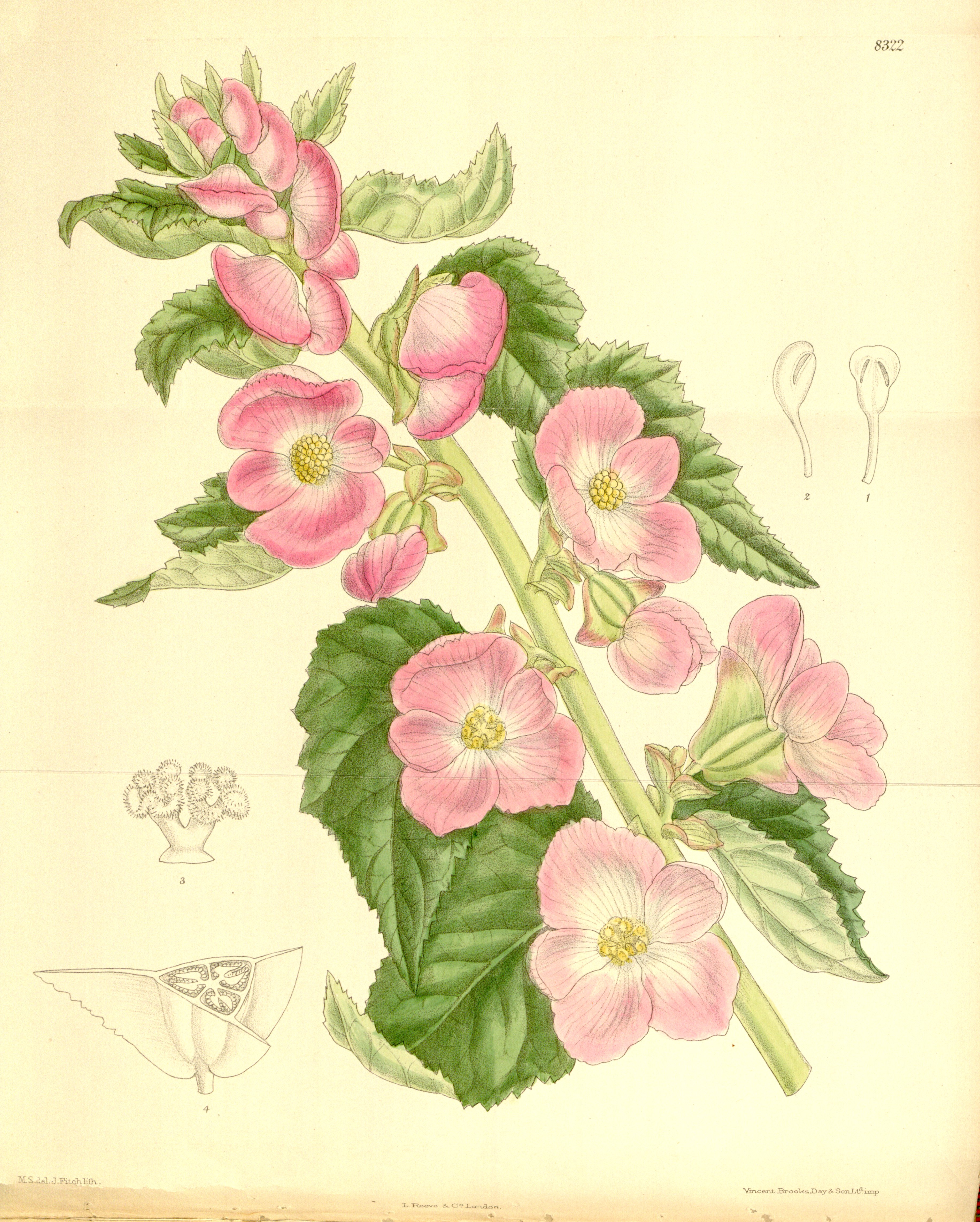 Begonia martiana var. grandiflora (= Begonia gracilis), Begoniaceae